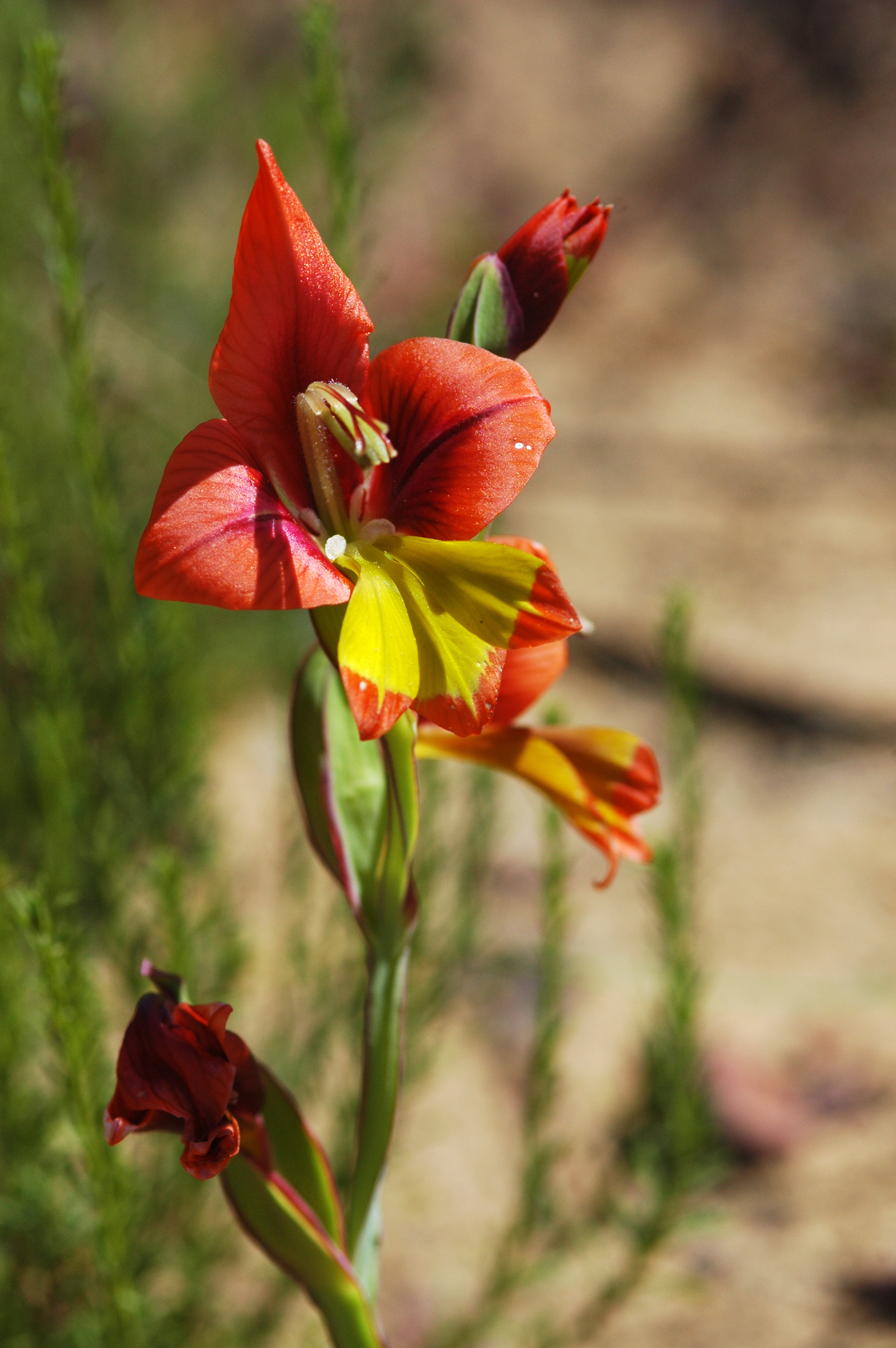 Siegwurz Gladiolus alatus L., Nahaufnahme, in den Cederbergs, Distrikt Westküste, Südafrika